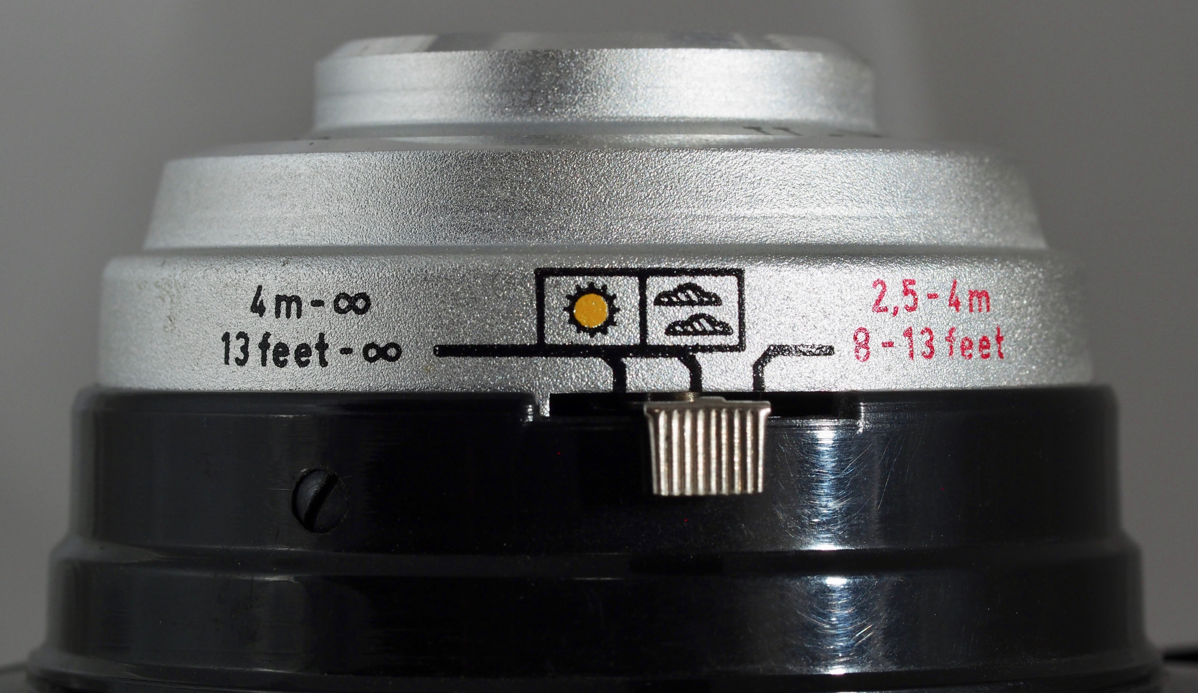 Click Blende 2 Symbole + Entfernung + Gelbfilter + Portraitlinse